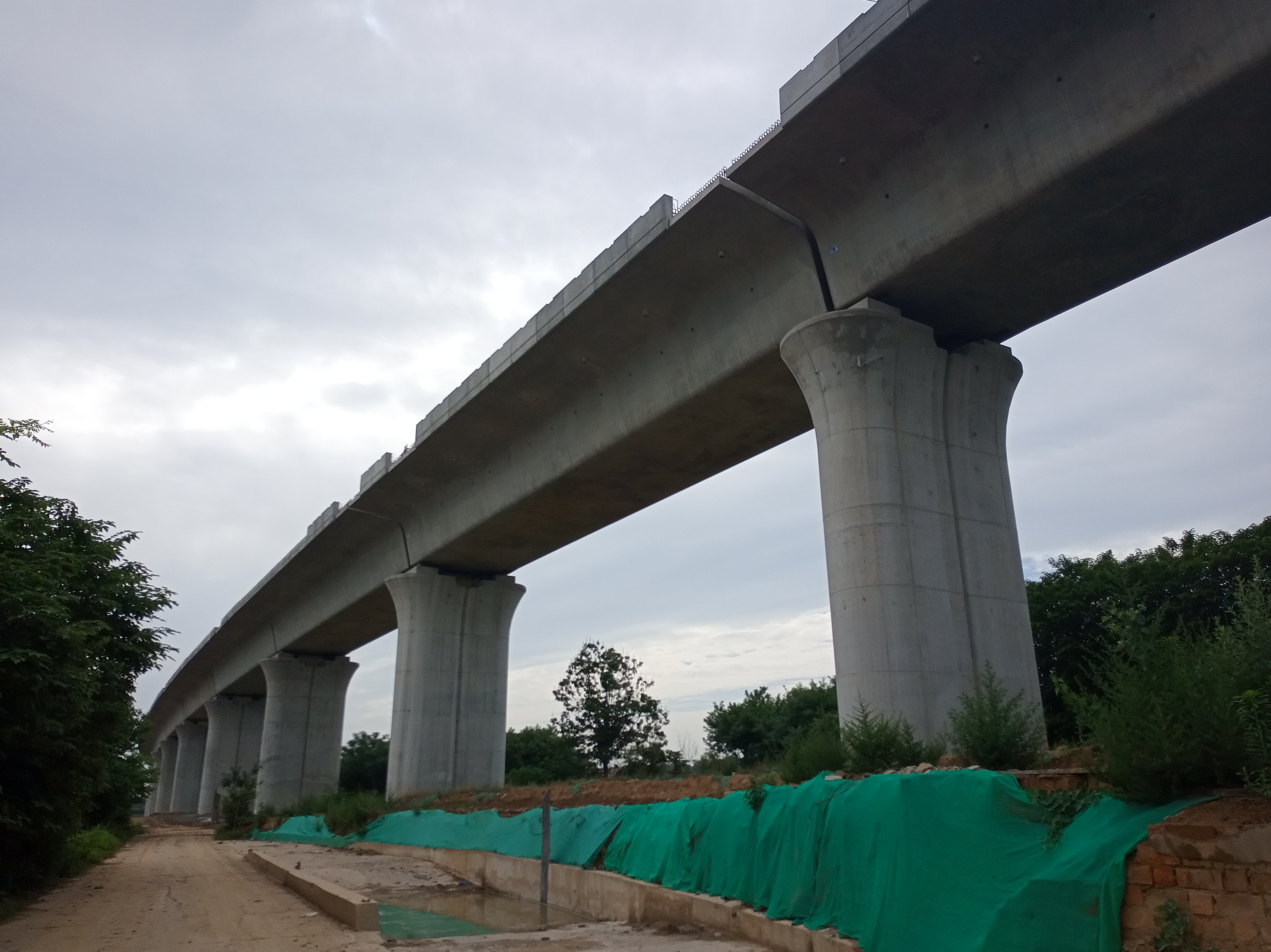 咸阳市渭城区银西高铁在沣泾大道附近